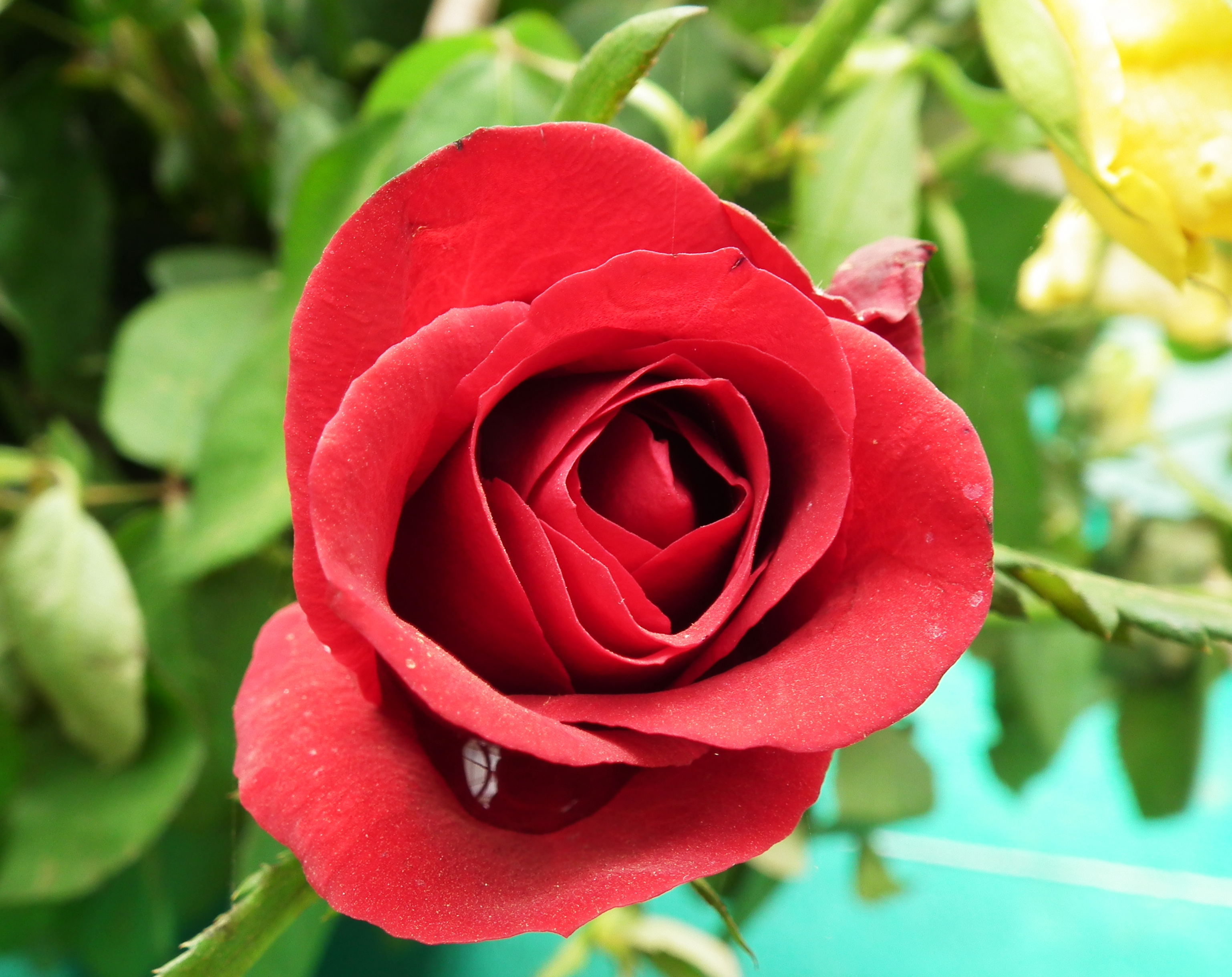 ബെംഗളൂരിലെ ലാൽ‌ബാഗിലെ റോസ് ഗാർഡനിൽ നിന്ന് ഒരു റോസ് പുഷ്പം